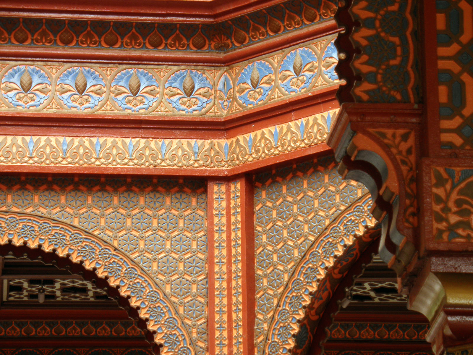 El Kiosco Morisco fue diseñado por el ingeniero José Ramón Ibarrola a finales del siglo XIX para ser el pabellón de México en la Exposición Universal de 1884–1885 y de la Feria de San Luis Missouri en 1902. En 1910 se encontraba instalado en la Alameda Central y fue trasladado a Santa María la Ribera pues en su lugar se construyó el Hemiciclo a Juárez.